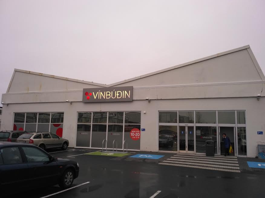 Façade du magasin d'alcool Vinbudin à Reykjavik (Islande).